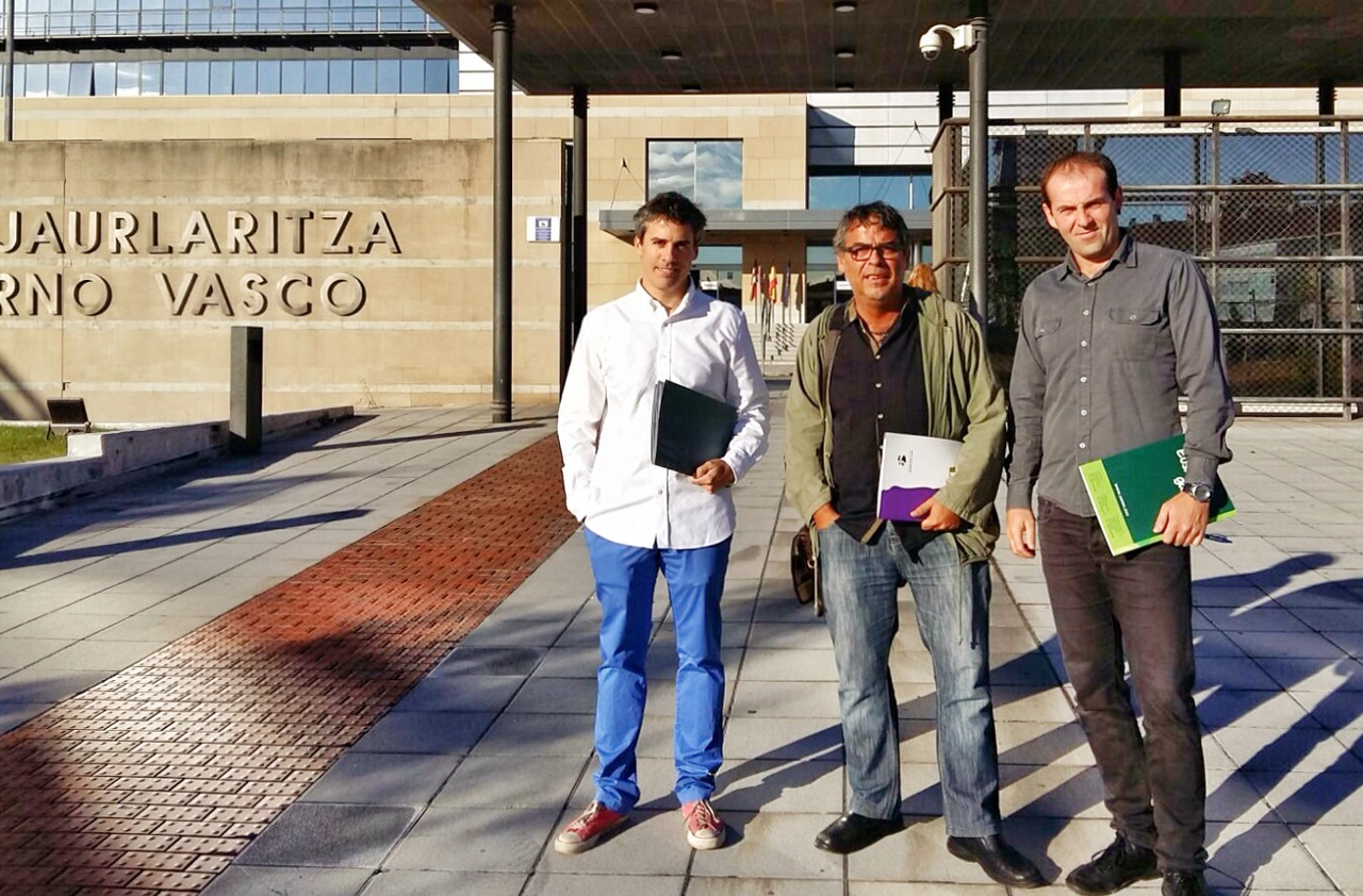 Lakua ELE